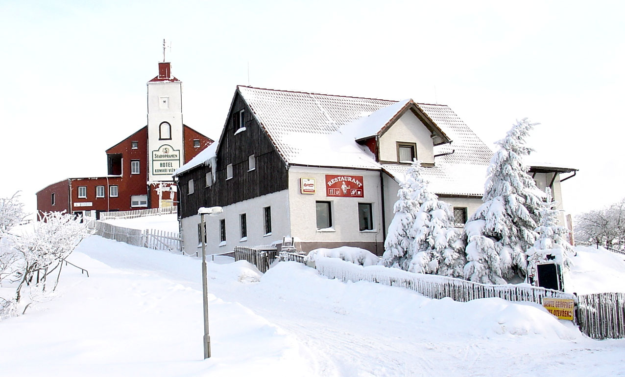 Mückenberg (Komáří hůrka) im Erzgebirge und seine beiden Gaststätten